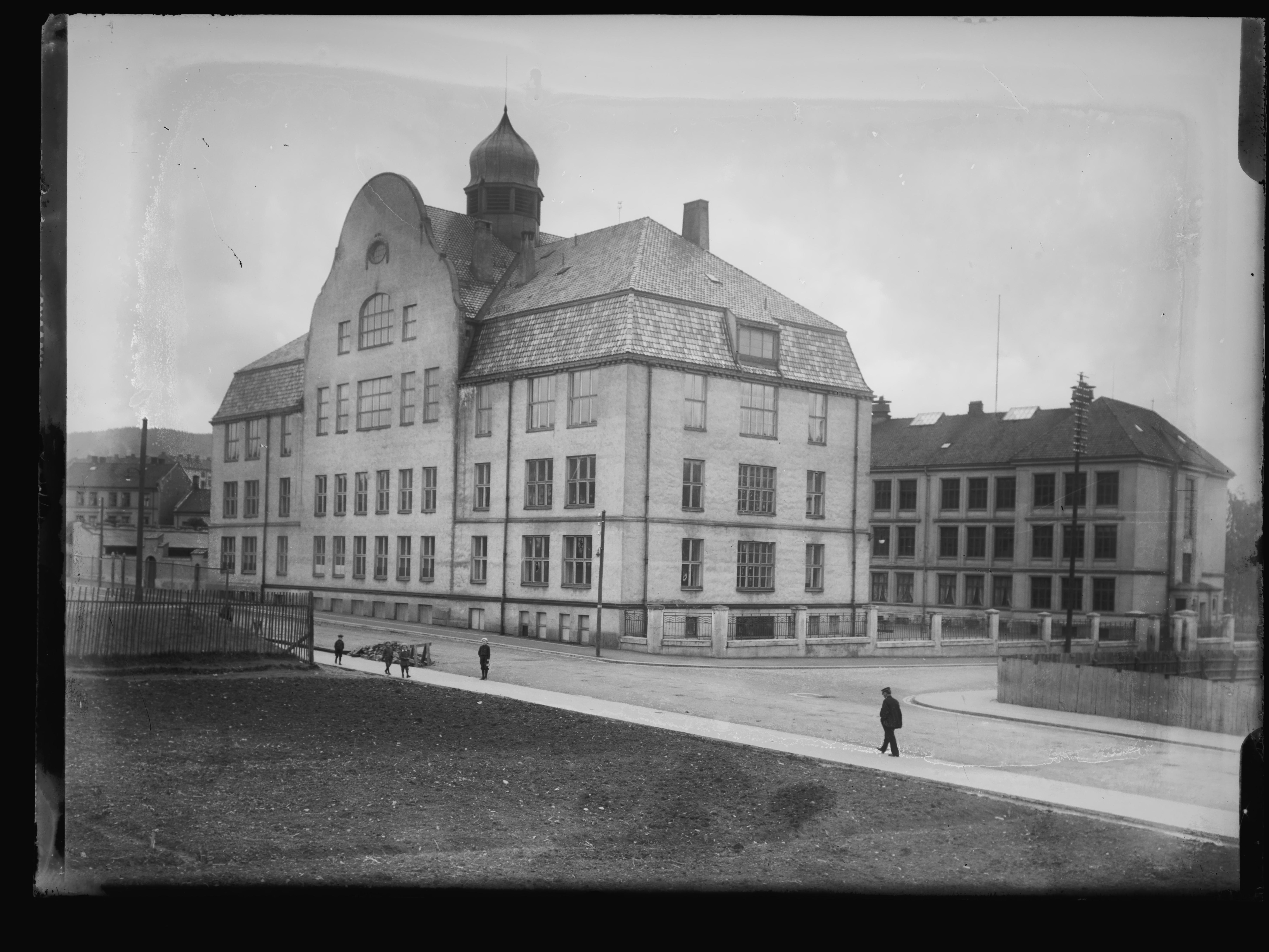 Bildet er hentet fra Nasjonalbibliotekets bildesamling. Anmerkninger til bildet var: Påskrift arkivark: Bjølsen nye skole Arkivnummer: 195 Oslo, Oslo, Oslo